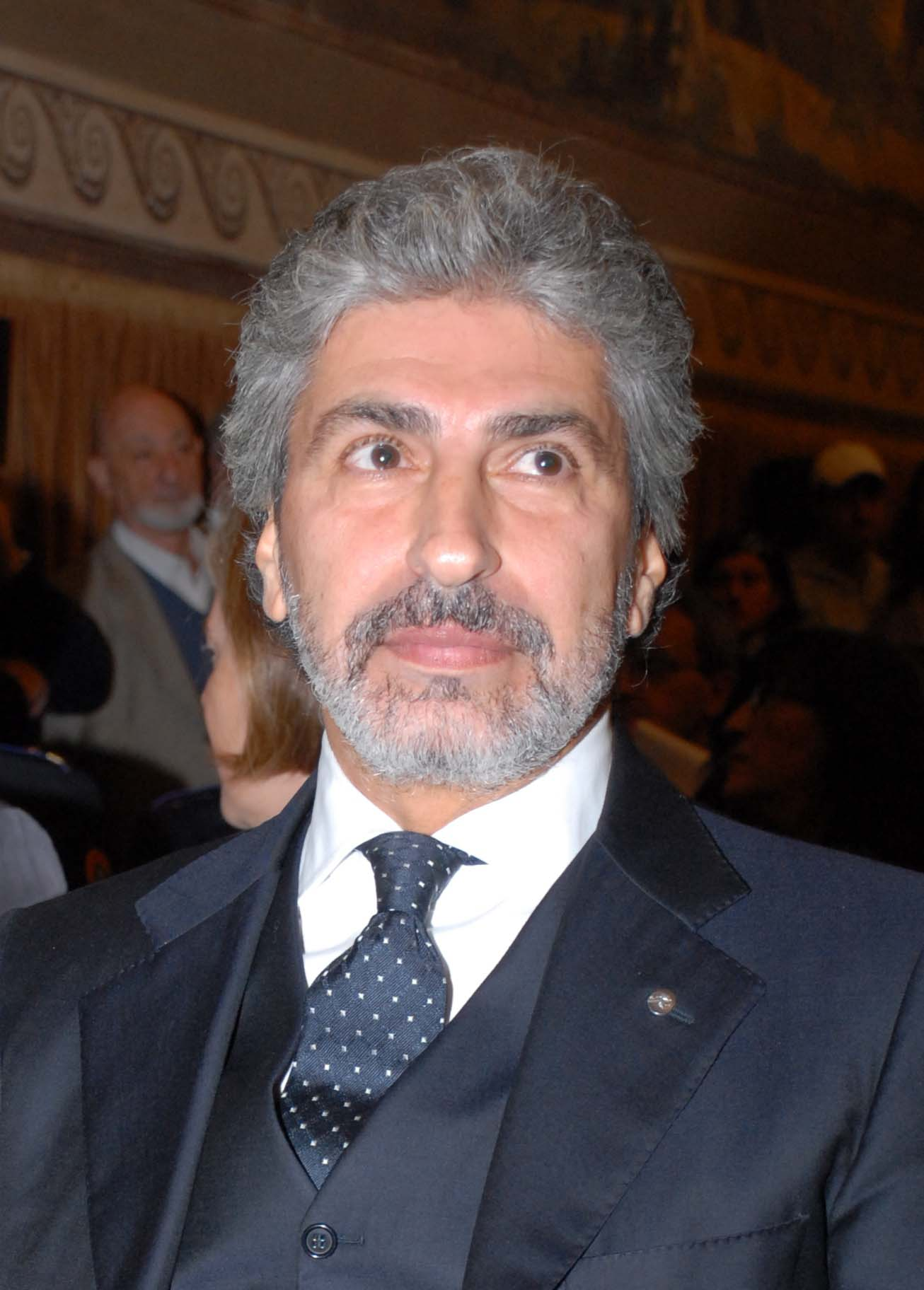 A.R. Arabnia